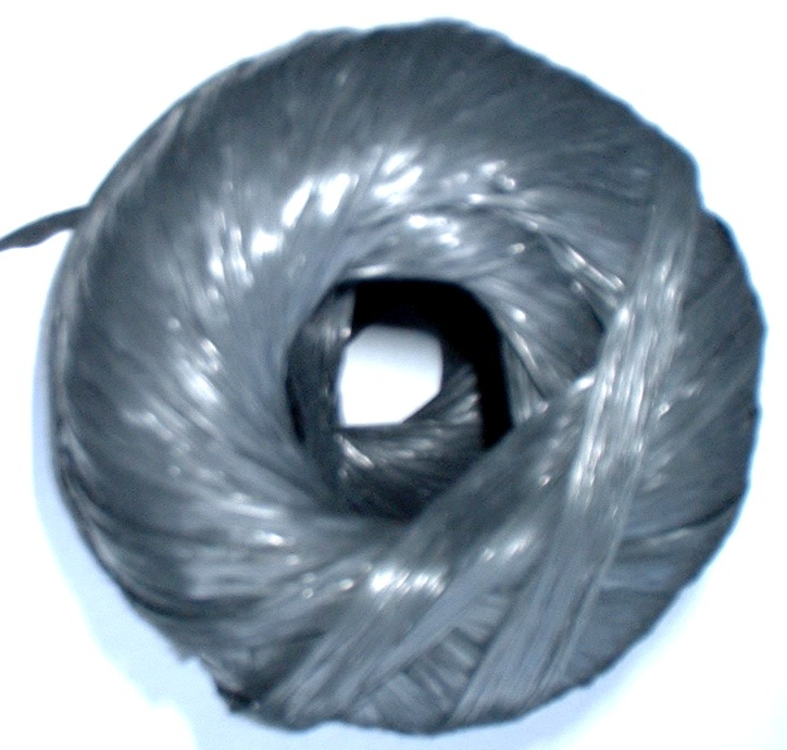 Knäuel mit PP-Folienbändchen